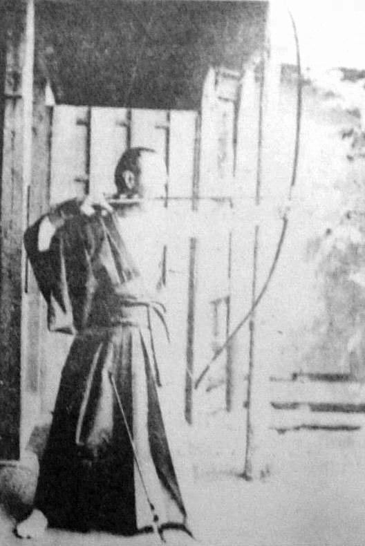 a Japanese man 徳川慶喜 (Yoshinobu Tokugawa)